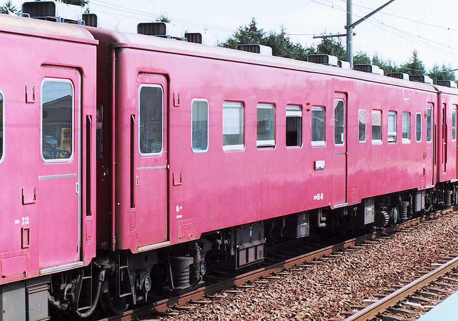 JR北海道 オハ51 41 3扉改造車